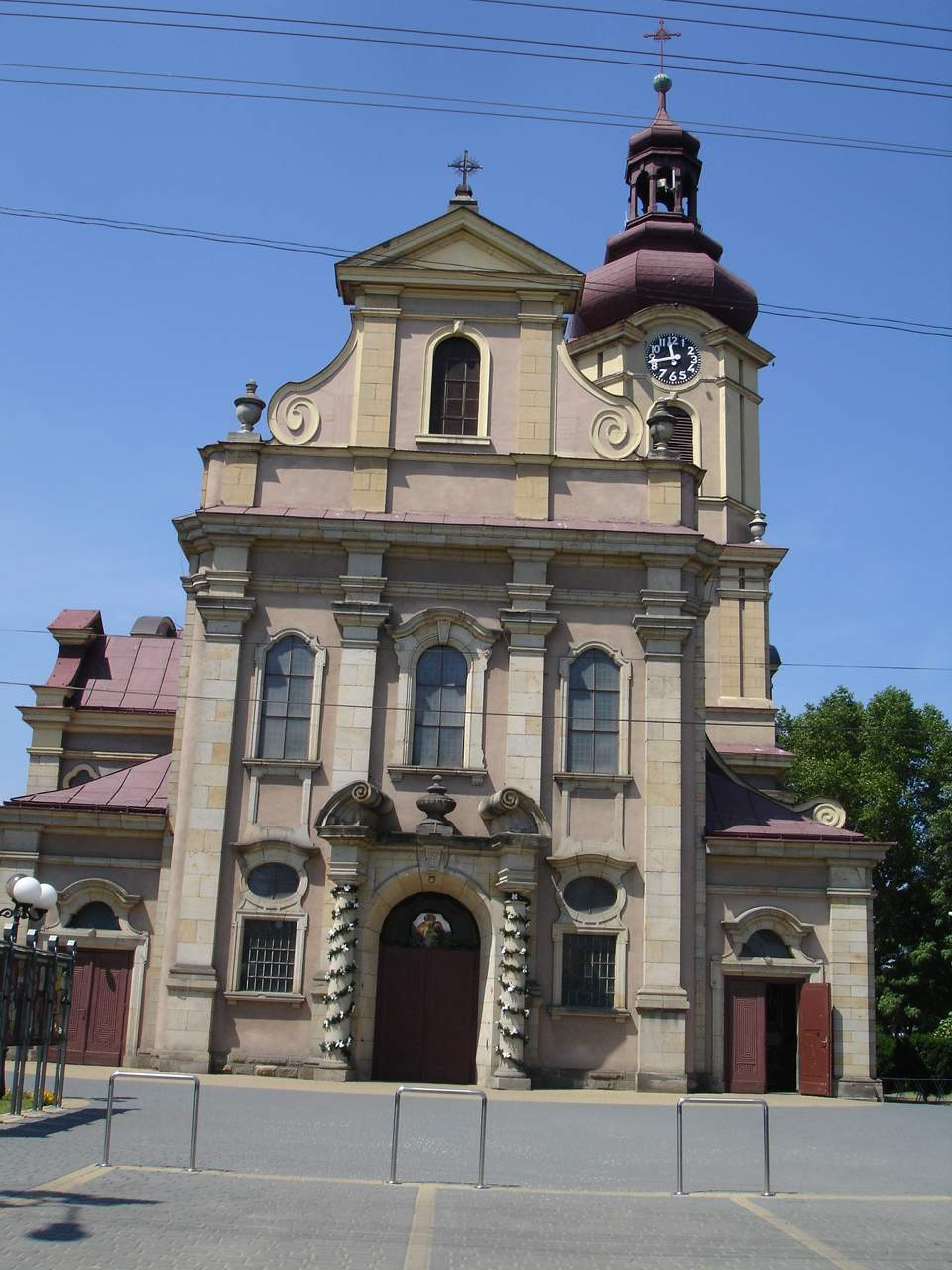 Boguszowice latin church